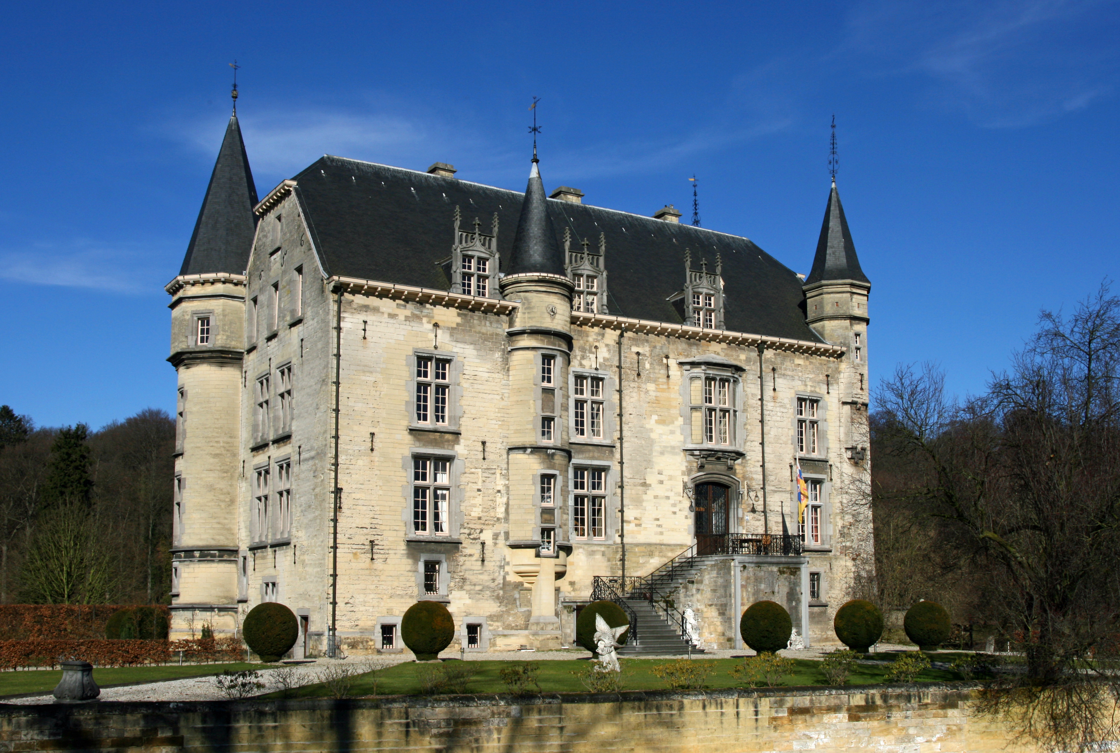 Kasteel Schaloen - Oud Valkenburg